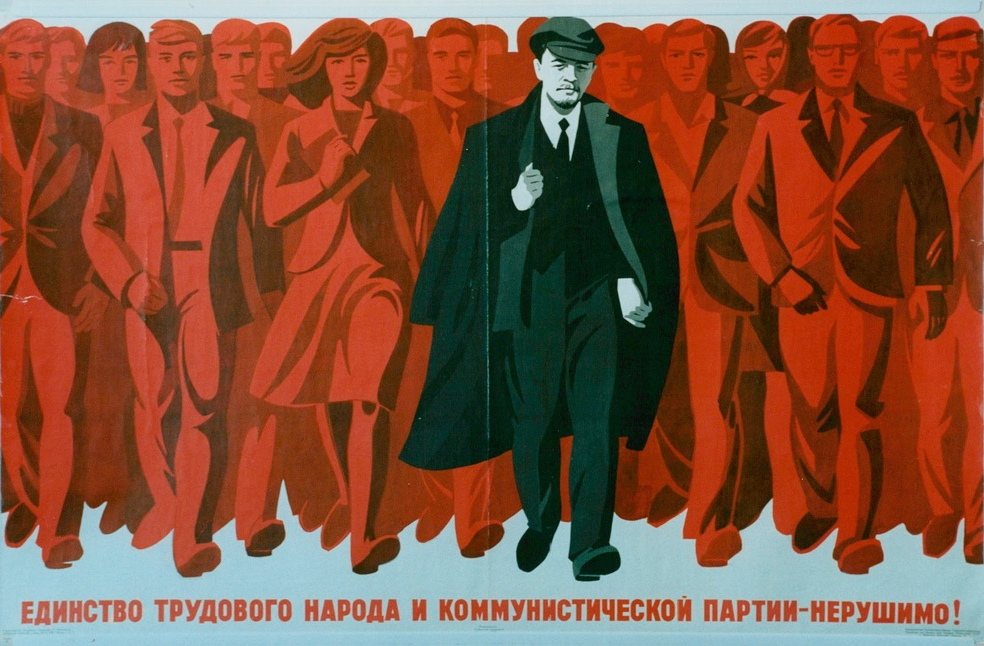 ЕДИНСТВО ТРУДОВОГО НАРОДА И КОММУНИСТИЧЕСКОЙ ПАРТИИ-НЕРУШИМО!